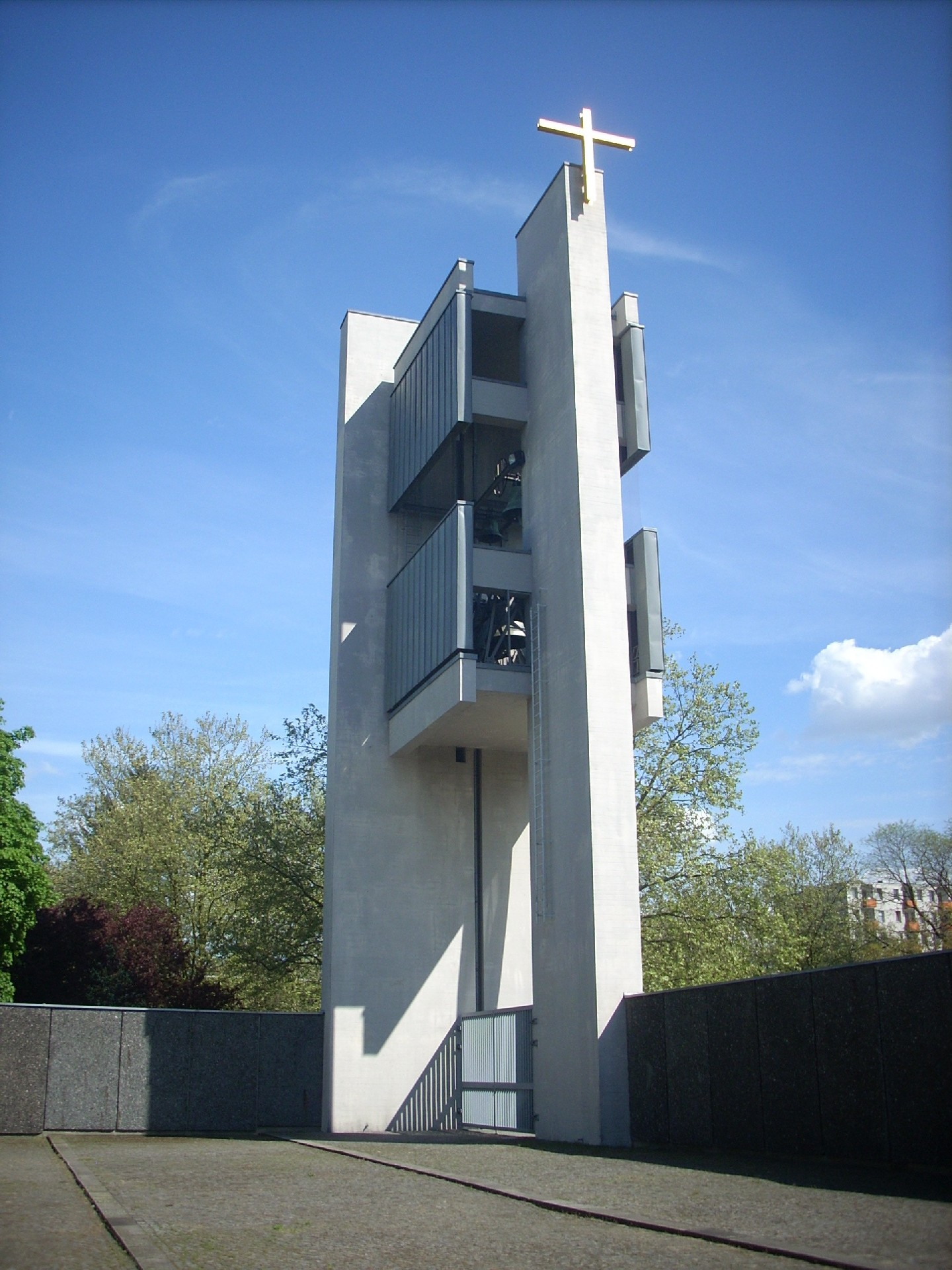 Berlin, Kath. Kirche Maria Regina Martyrum, Turm